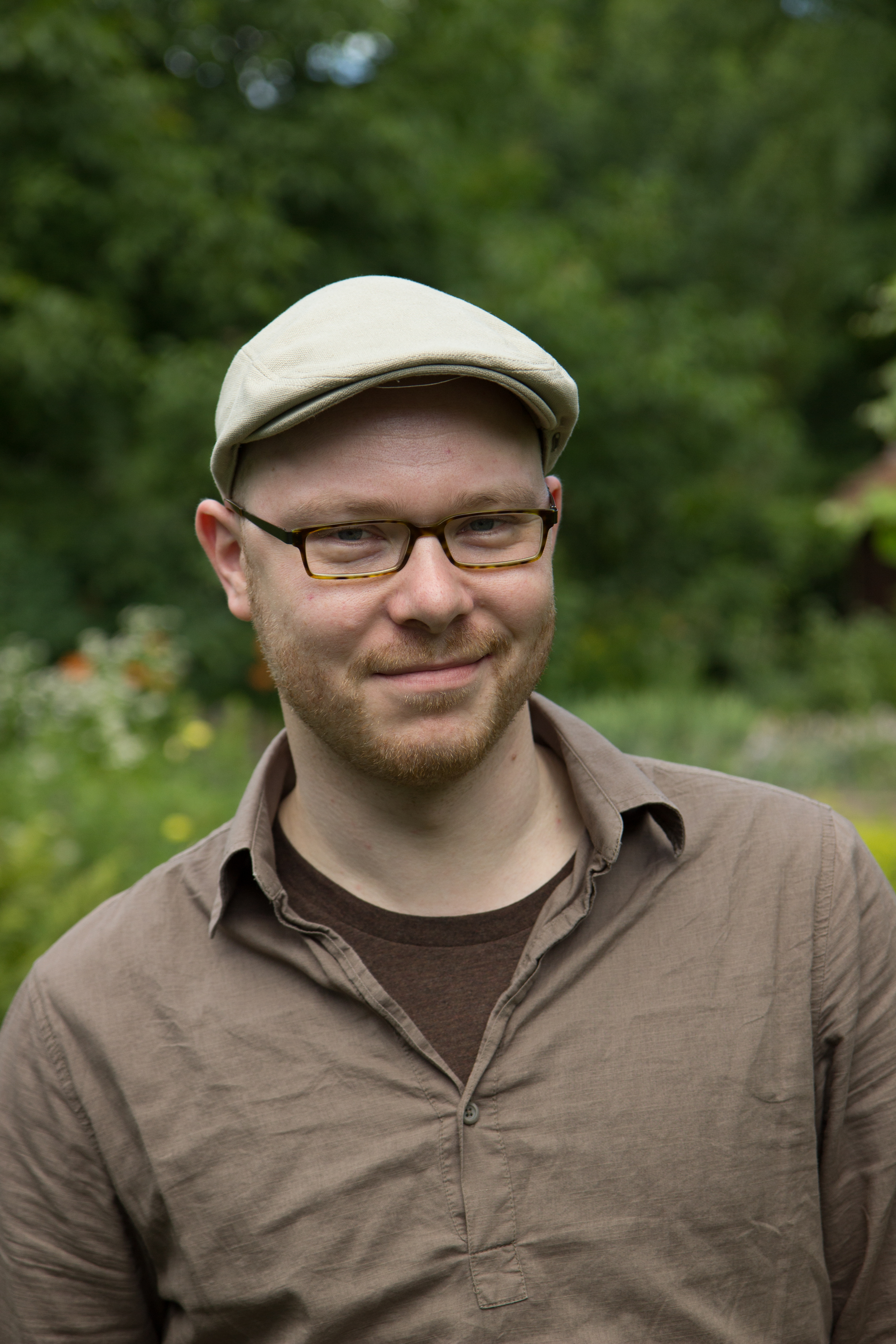 Der Schriftsteller Christoph Wenzel beim Hausacher Leselenz 2013